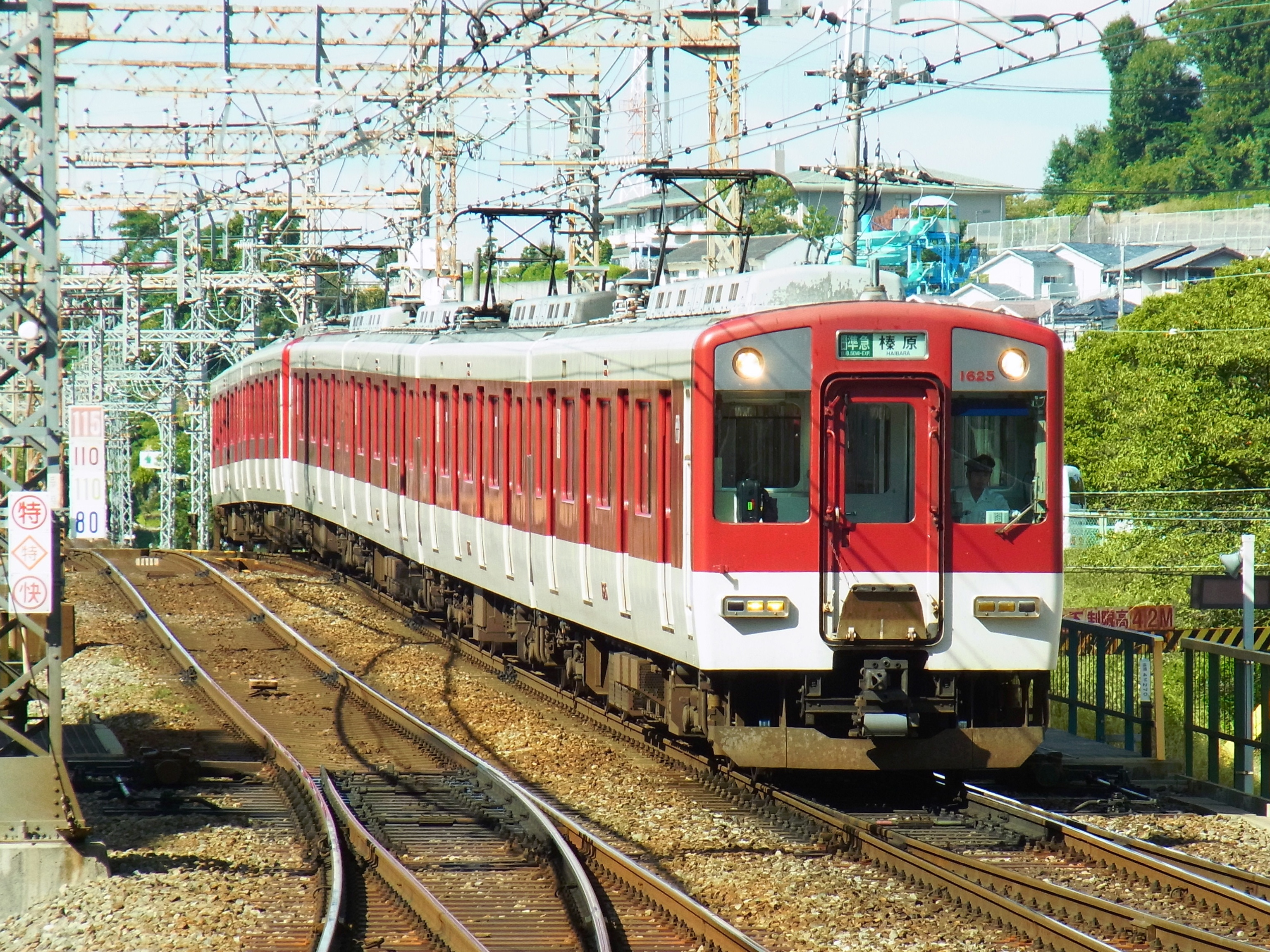 河内国分駅にて 榛原行き区間準急 2012.10.09